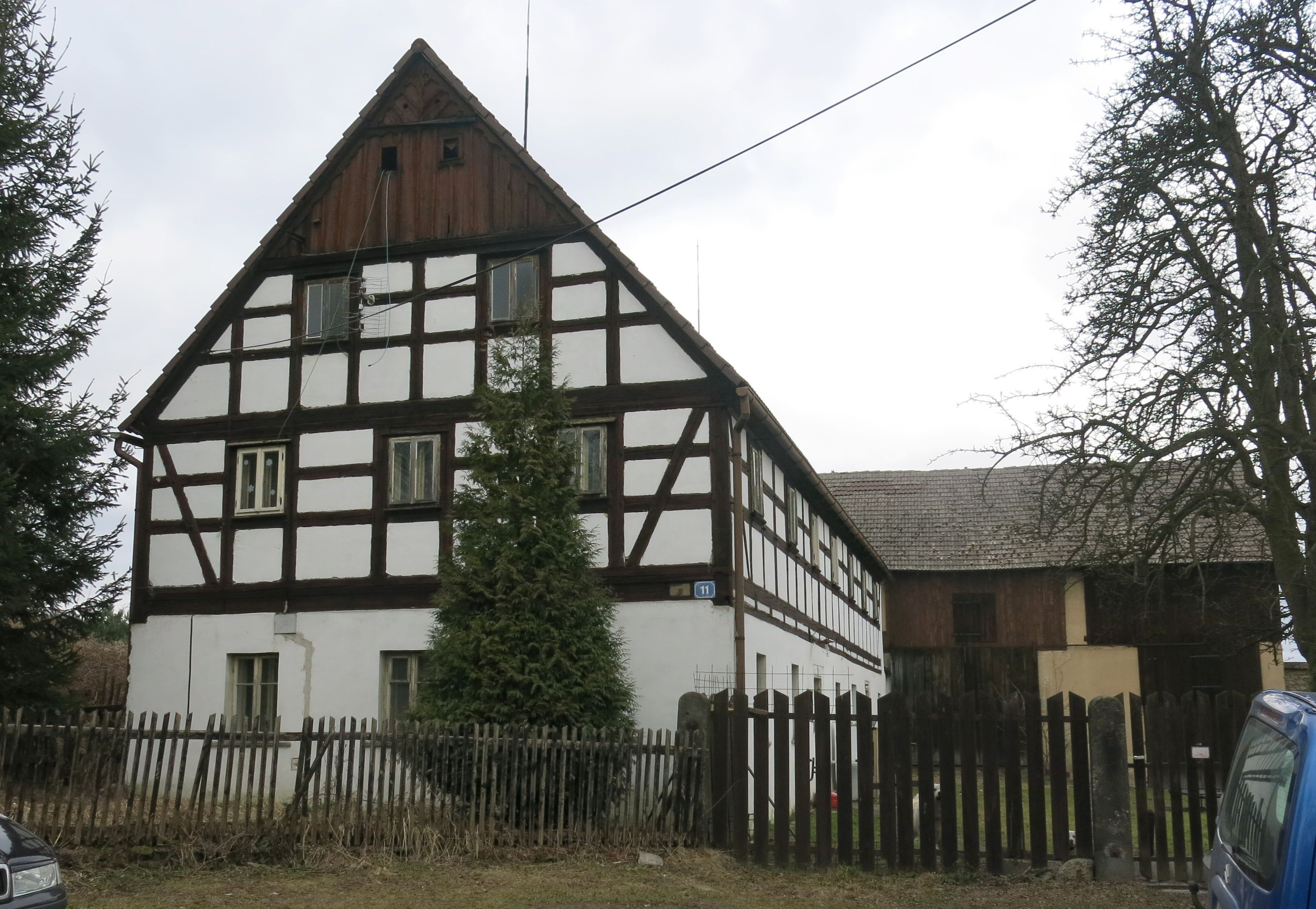 Usedlost čp. 11, Radešín 11, Radešín (Chuderov).